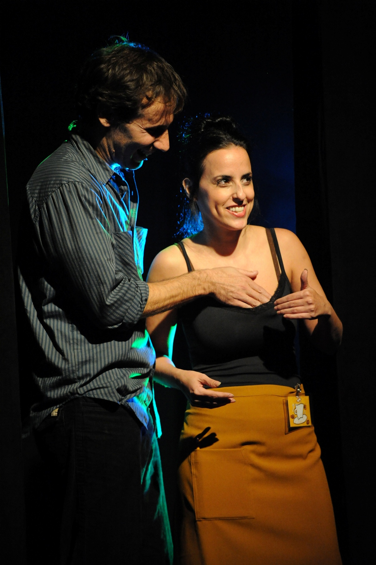 מכניס 2